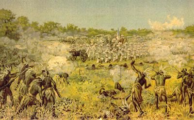 Combat de Coolela. Gravure de la fin du XIXème siècle